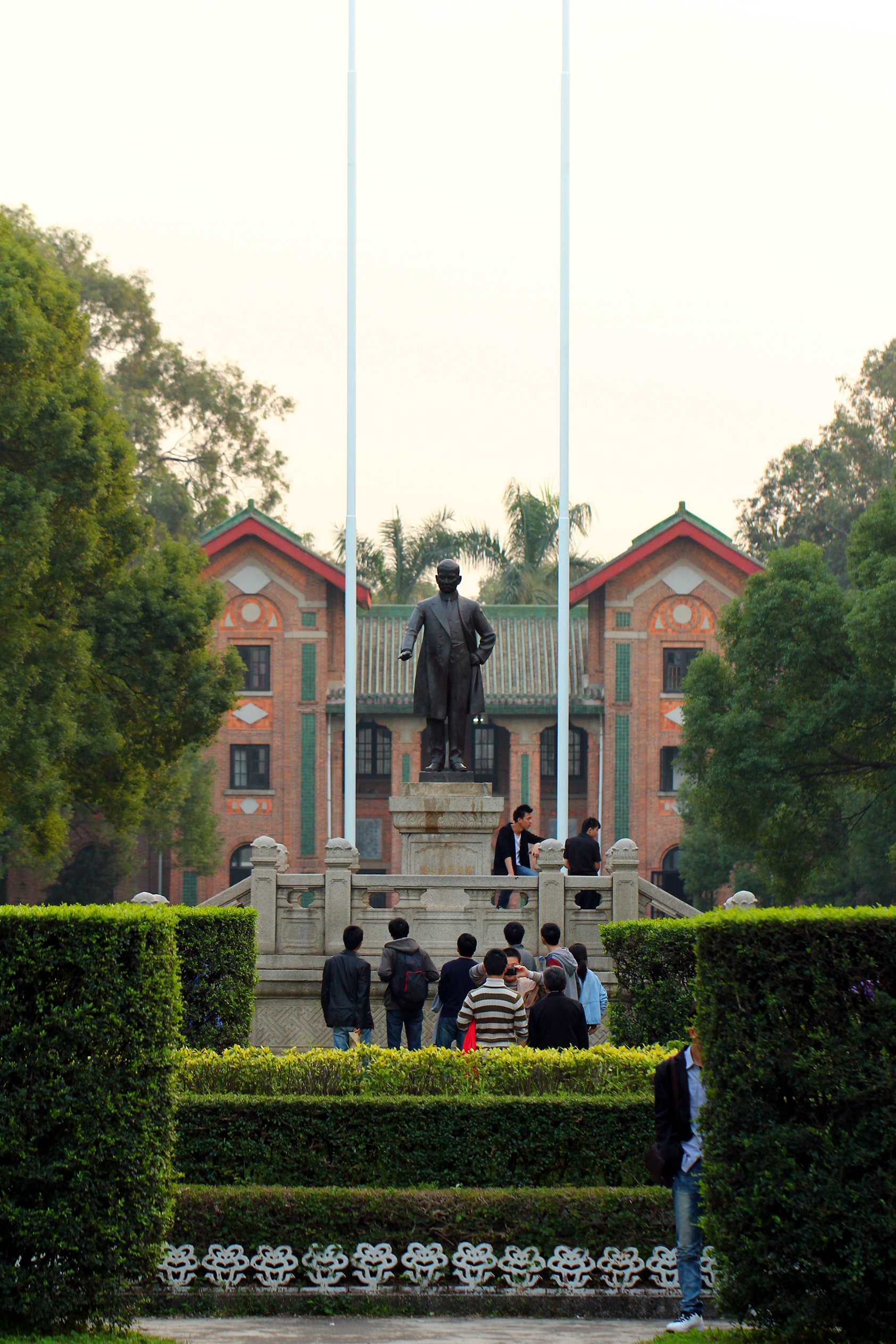 中山大学孙中山铜像。